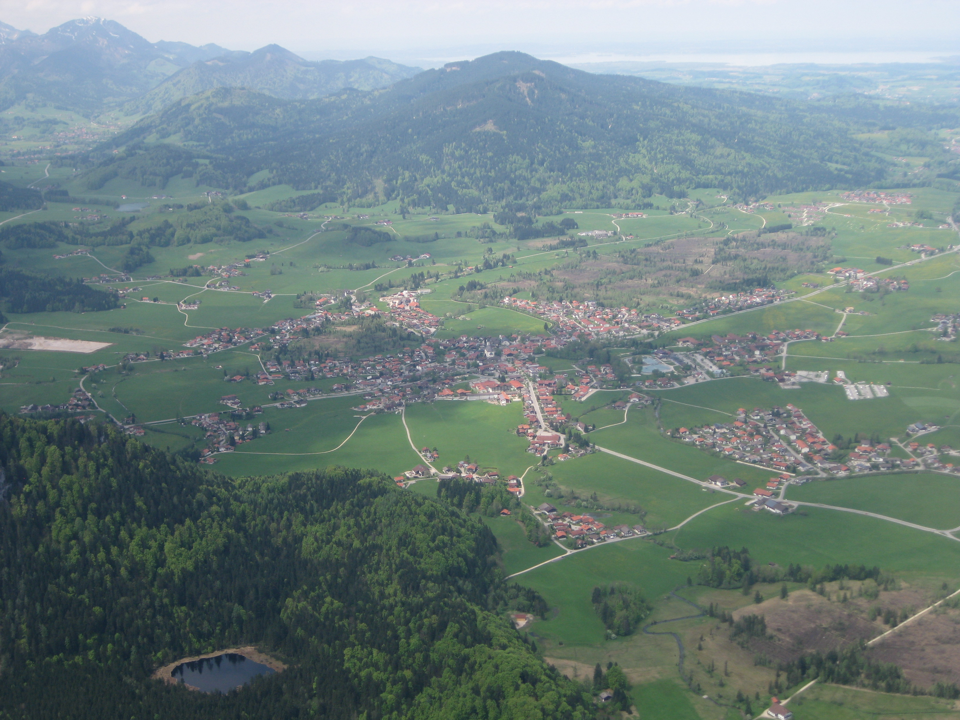 Inzell (Blick vom Gruberhörndl Richtung Chiemsee), Landkreis Traunstein, Bayern